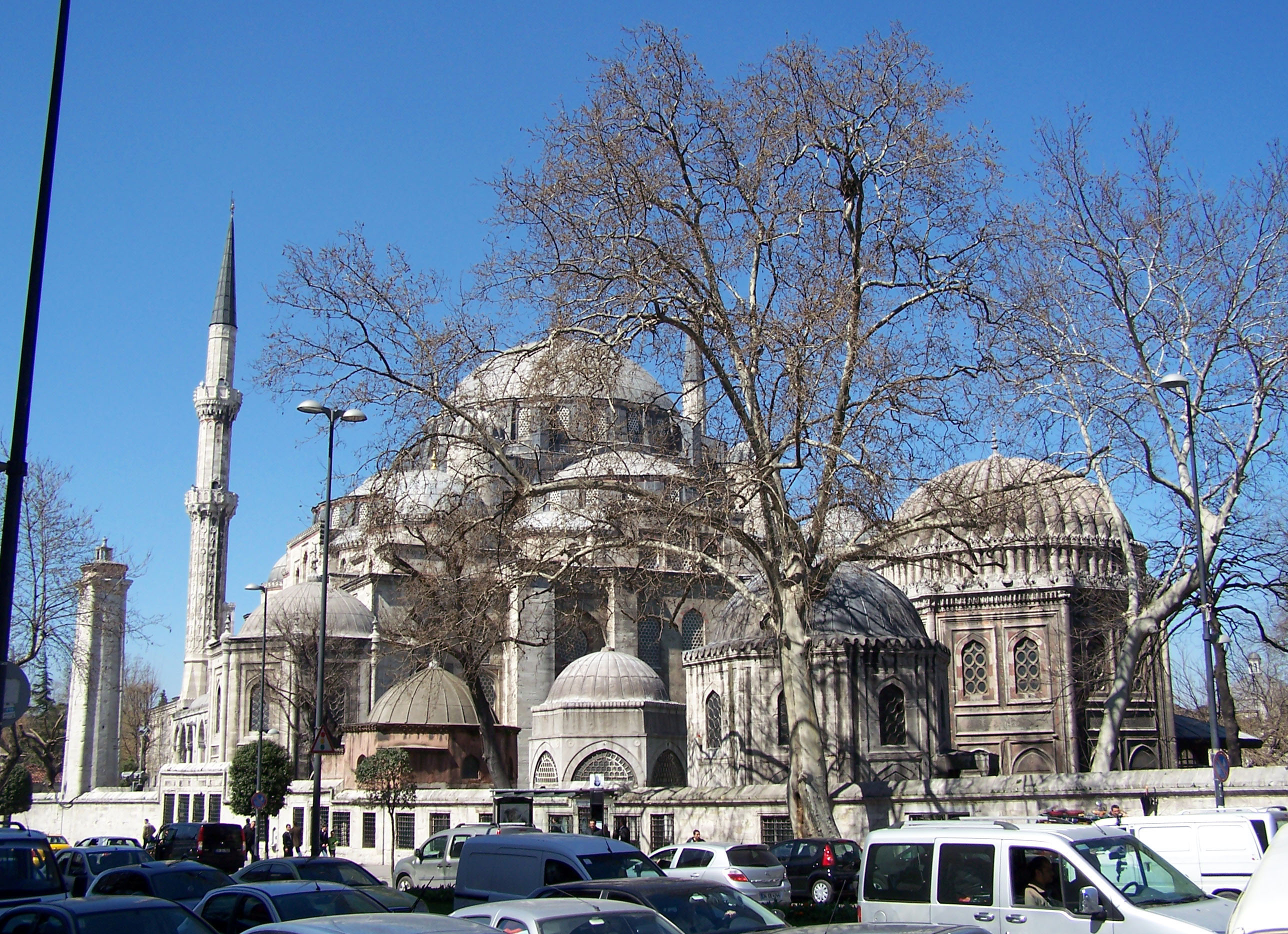 Şehzade Camii in Fatih, İstanbul, Turkey